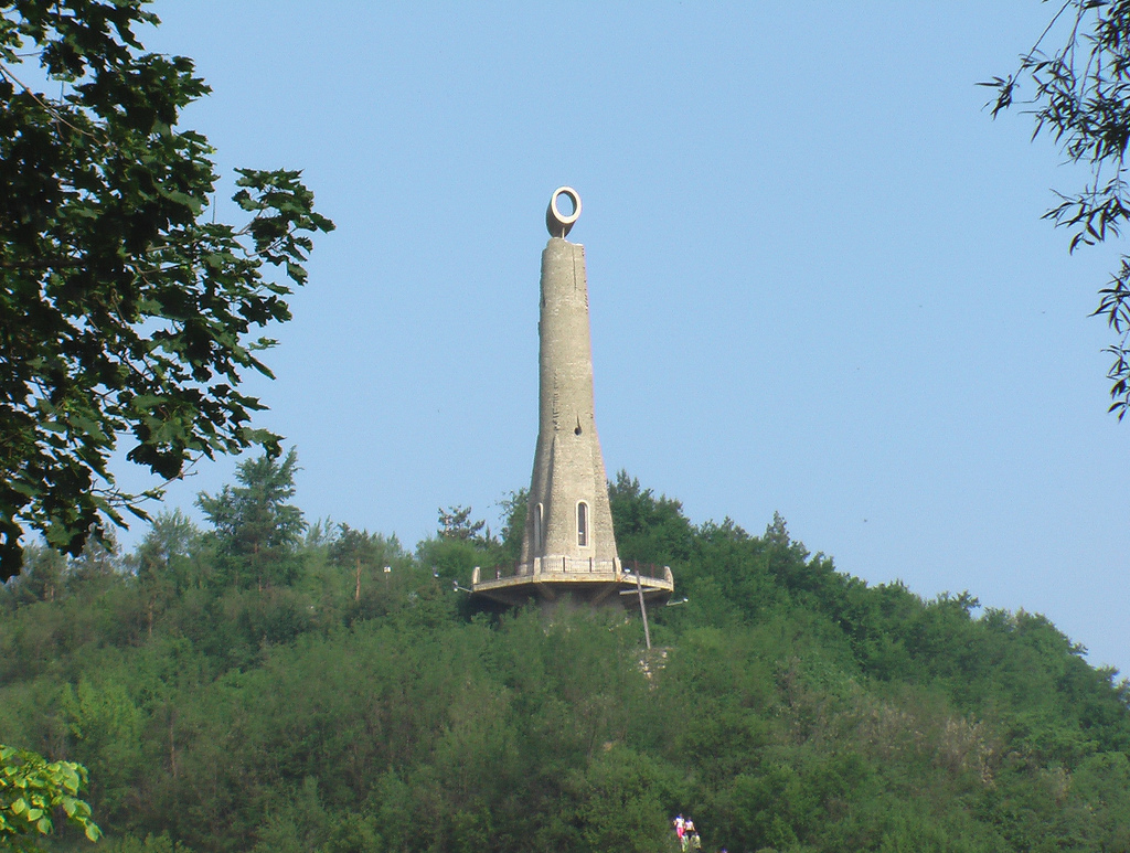 Luminarea Recunostintei din or.Soroca, Rep.Moldova. Acest monument arhitectural a fost inchinat lui Badea Mior, presupusul autor al Baladei Folclorice "Miorita". Ideea i-a apartinut scriitorului Ion Druta si cu sustinerea guvernului in 2000 a fost transpusa in viata.